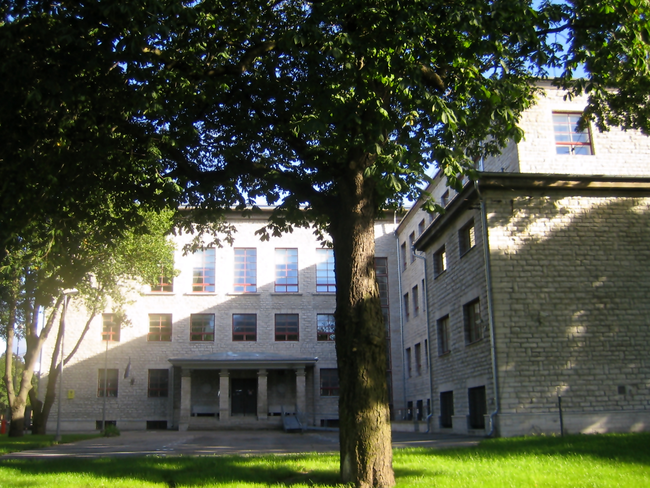 Koolihoone Majaka tn 2, 1936. a. Tallinna Teeninduskool (TeKo)